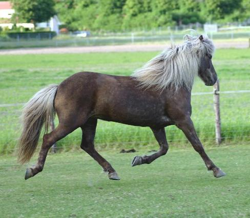 Black Silver Dapple